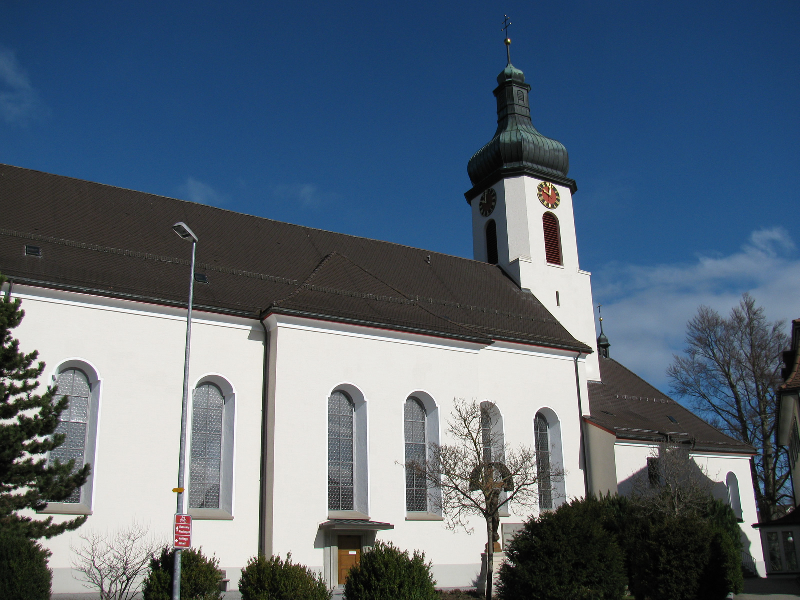 Heiligkreuzkirche in Kirchberg SG, Schweiz